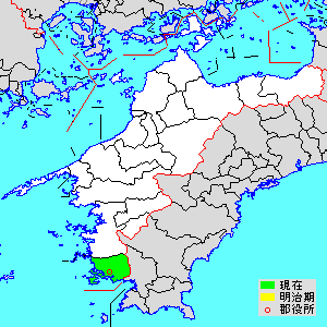 에히메현 미나미우와군